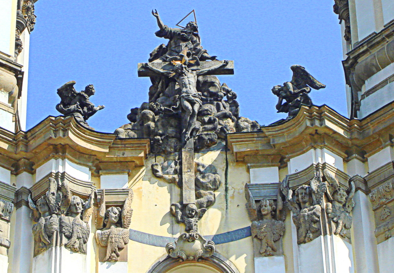 Krzeszów - Bazylika Wniebowzięcia Najświętszej Maryi Panny, dawniej kościół klasztorny NMP Łaskawej (zabytek nr rejestr. A/1989/489 z 20.02.1959)